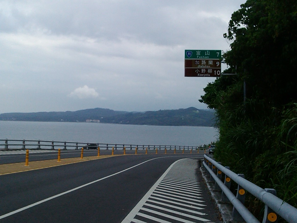 美麗灣景緻及通往台東市的里程碑